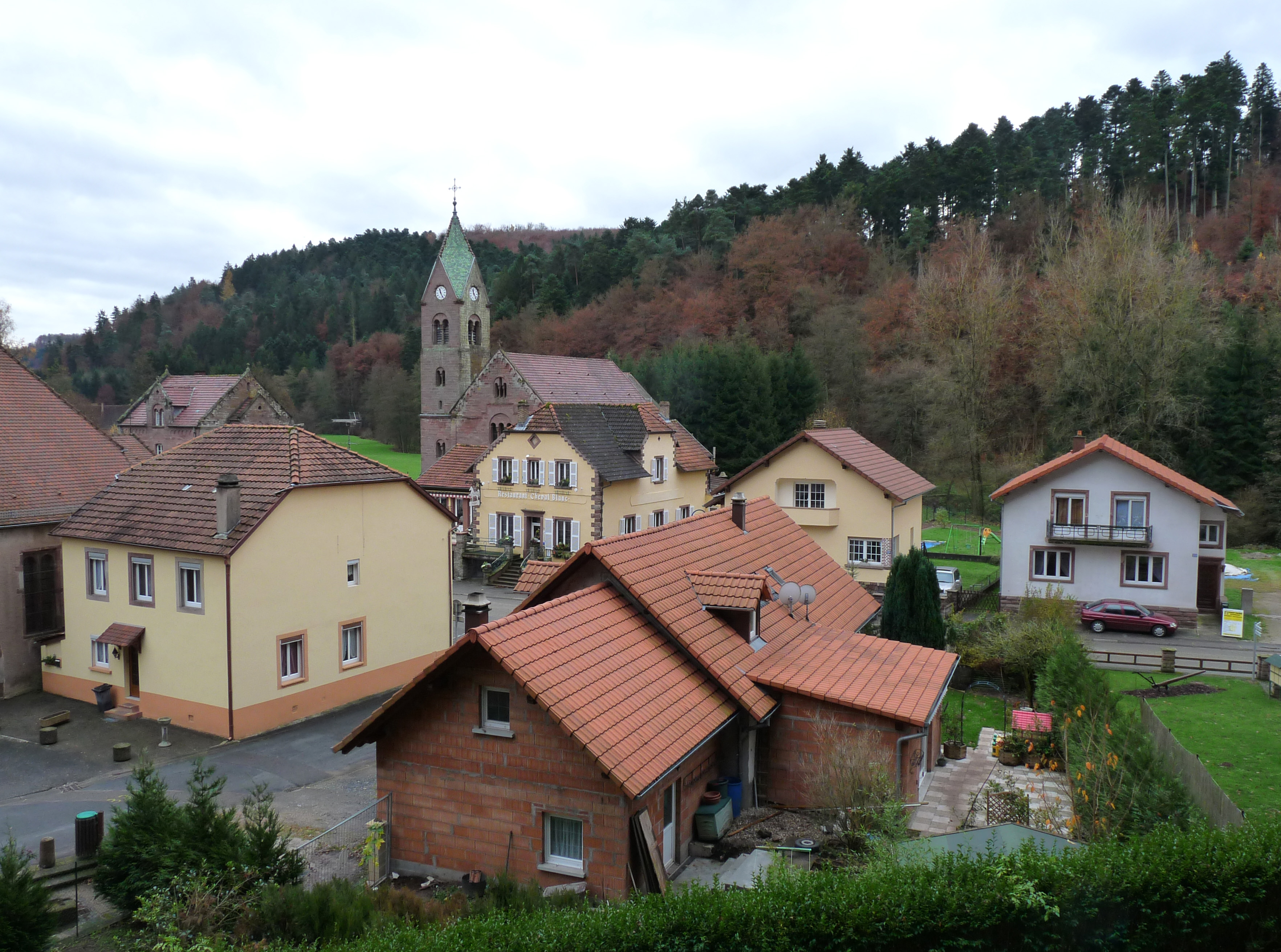 Eglise de Graufthal (commune d'Eschbourg, Bas-Rhin), vue depuis les maisons troglodytes